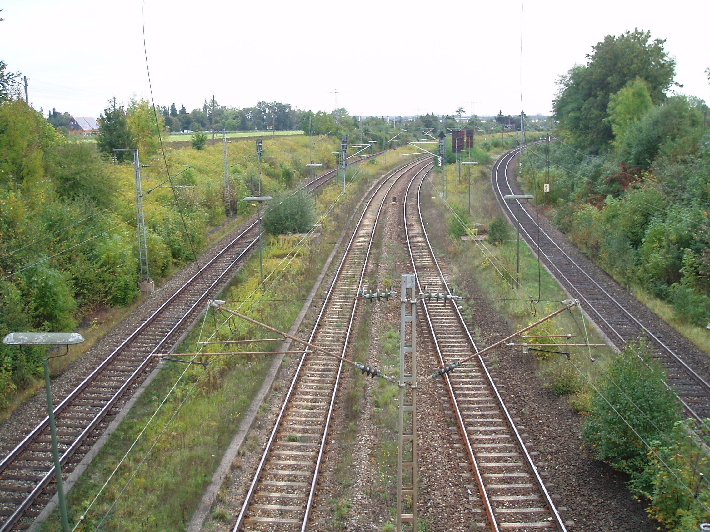 Bahnhofteil Augsburg-Hirblinger Strasse